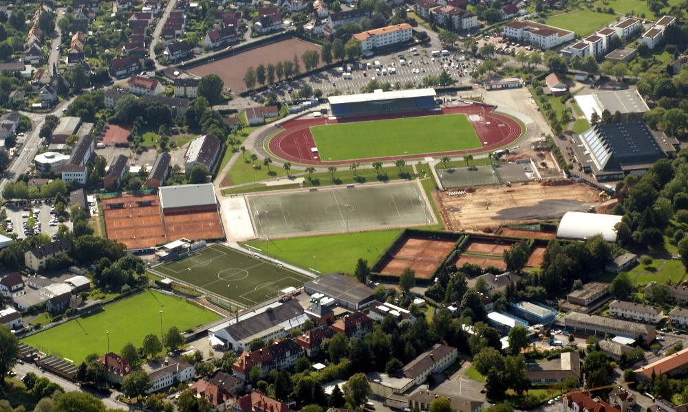 Luftbild des Sportparks in Marburg. Rechts im Bild sind die Georg-Gaßmann-Halle und darunter die Großsporthalle zu sehen, links daneben das Georg-Gaßmann-Stadion. Auf der anderen Seite des großen Parkplatzes befindet sich der Hartplatz der Sportfreunde Blau-Gelb Marburg. Die Kunstrasenplätze werden von verschiedenen Marburger Fußballvereinen genutzt, der weiter unten im Bild befindliche vor allem durch die BSF Richtsberg. Links neben dem größeren Kunstrasenplatz befinden sich zwei Beachvolleyballfelder, rechts davon ein Kunstrasenkleinfeld, der zum Zeitpunkt der Aufnahme noch nicht existente Skatepark sowie der auf dem Bild noch im Bau befindliche Kunstrasen-Hockeyballplatz, der auch für Lacrosse verwendet wird. Die Tennisplätze links und rechts im Bild gehören den Marburger Tennisvereinen TC und TV und werden auch durch diese genutzt. Links unten im Bild ist das Stadion an der Gisselberger Straße des VfB zu sehen.